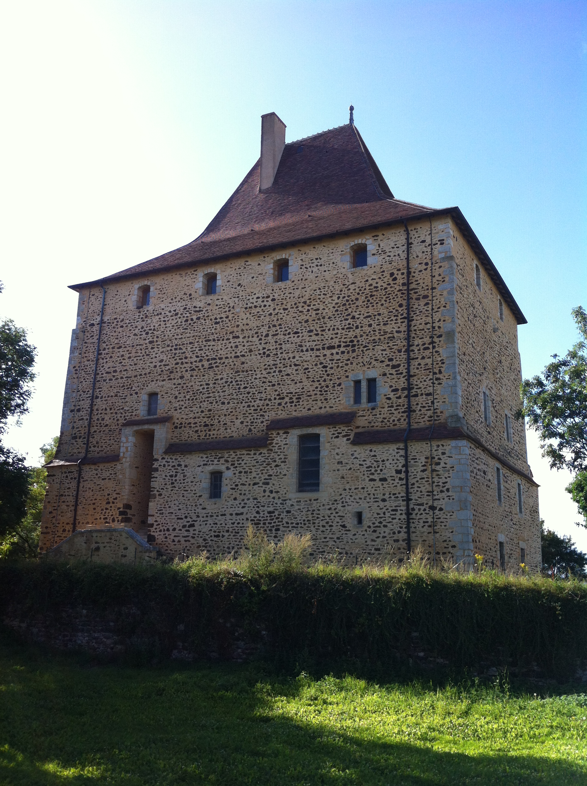 Tour de Vèvre, Neuvy-deux-Clochers